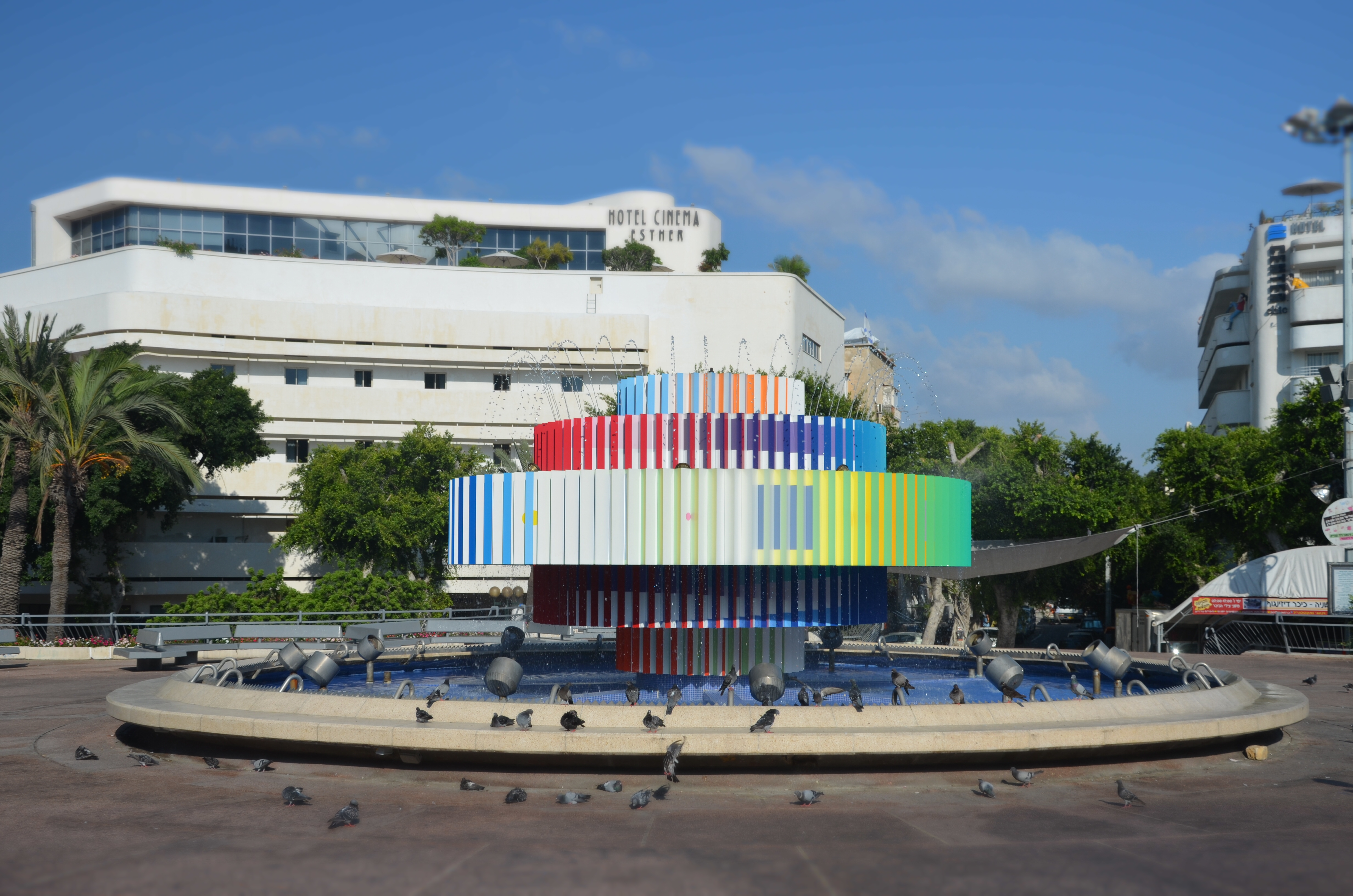 כיכר צינה דיזנגוף קרויה על שם צינה דיזנגוף, רעייתו של ראש העיר הראשון, מאיר דיזנגוף. הכיכר נחשבה במשך שנים רבות כאחד מסמליה של תל אביב. הכיכר הייתה חלק מתוכנית גדס, תוכנית מתאר לעיר תל אביב שהכין פטריק גדס, מתכנן ערים סקוטי. עיצוב הכיכר נעשה על ידי האדריכלית ג'ניה אוורבוך, שזכתה בתחרות העיצוב של הכיכר בשנת 1934. התכנון היה על פי קריטריונים של הסגנון הבינלאומי, שהיה הסגנון האדריכלי המרכזי בתל אביב בתקופה זו.